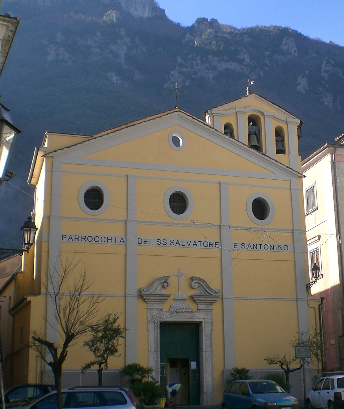 Chiesa del Santissimo Salvatore e Sant'Antonino: facciata